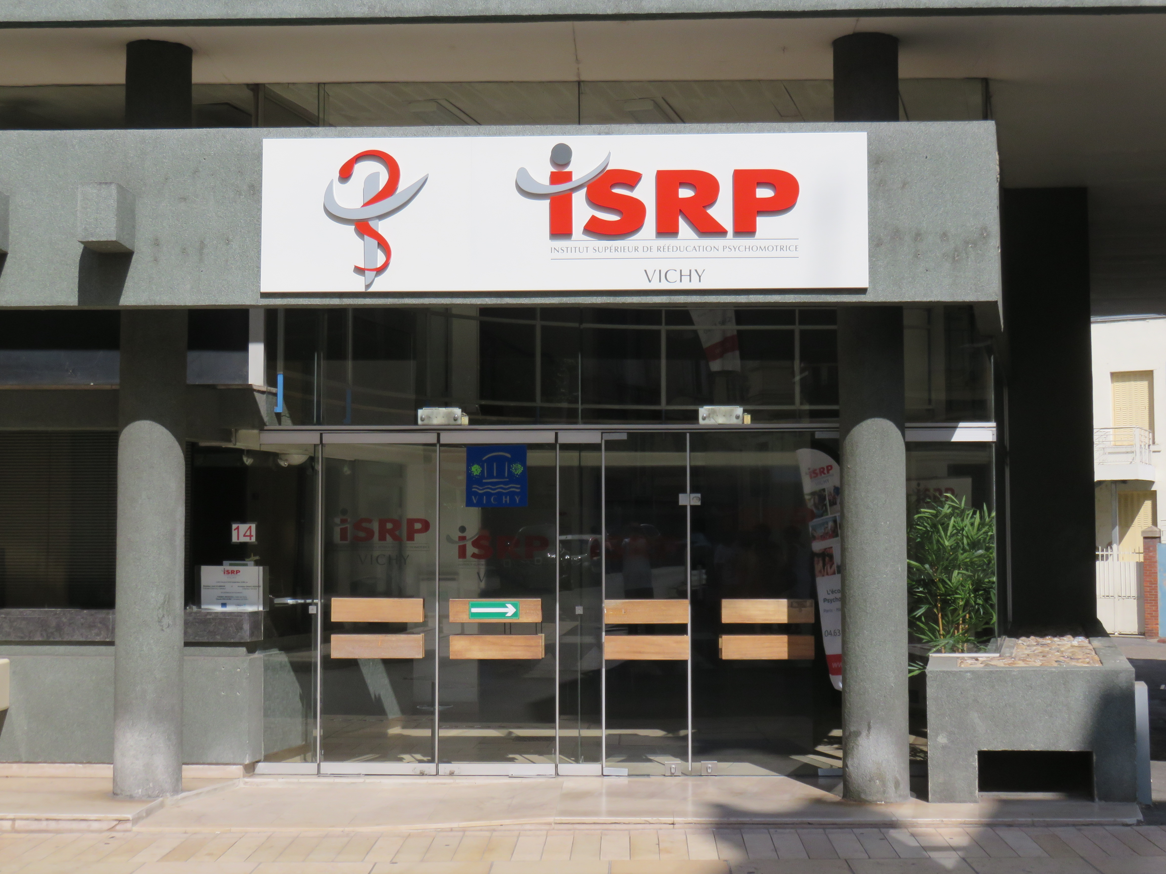 Entrée de l'ISRP (Institut Supérieur de Rééducation Psychomotrice) à Vichy (Allier, France).